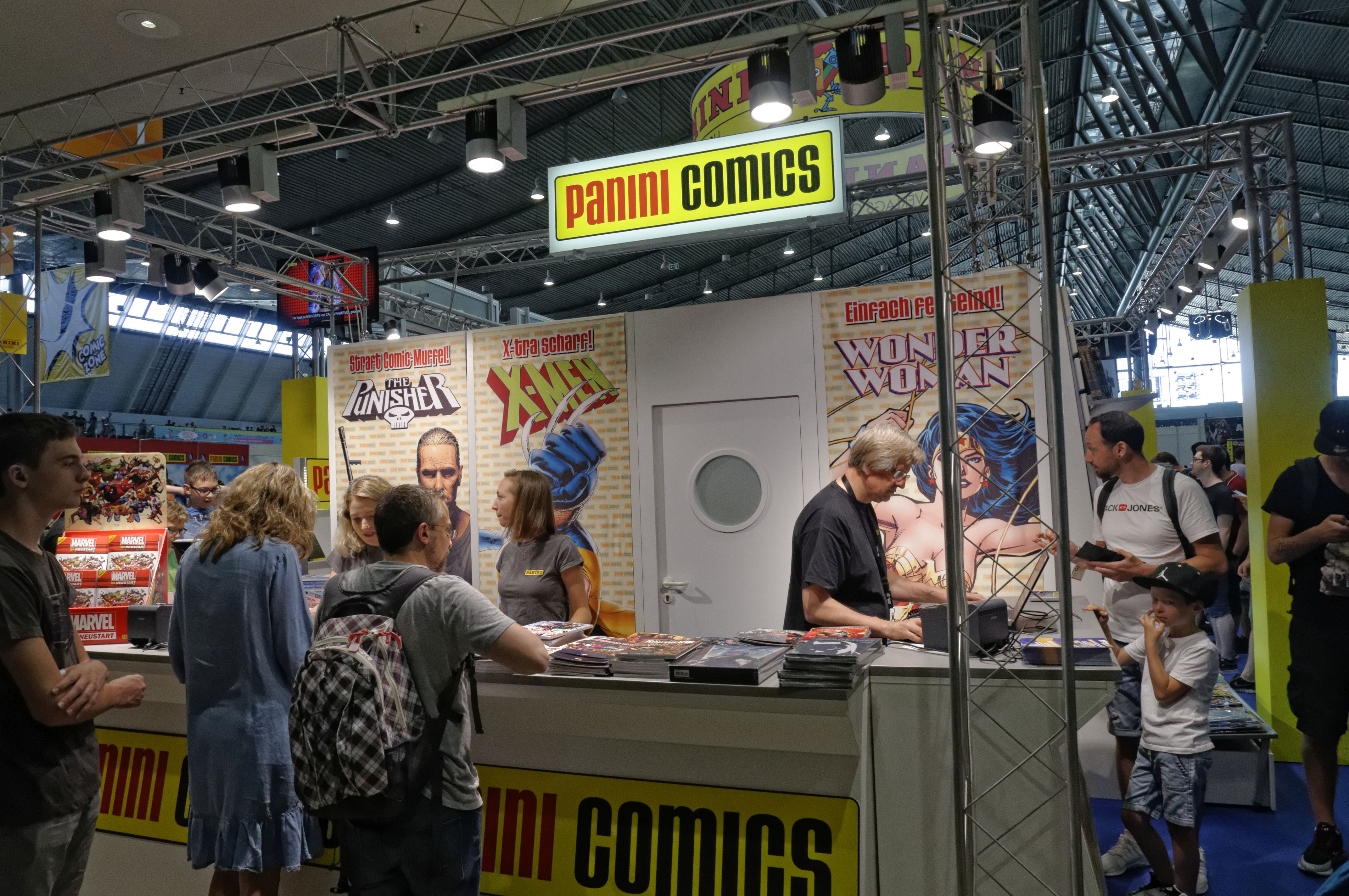 Bilder von der Comic Con Germany 2019 in Stuttgart